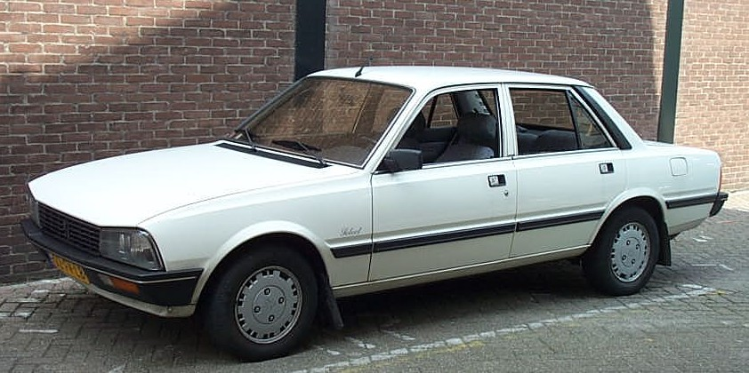 Peugeot 505 SR année modèle 1983 à 1985